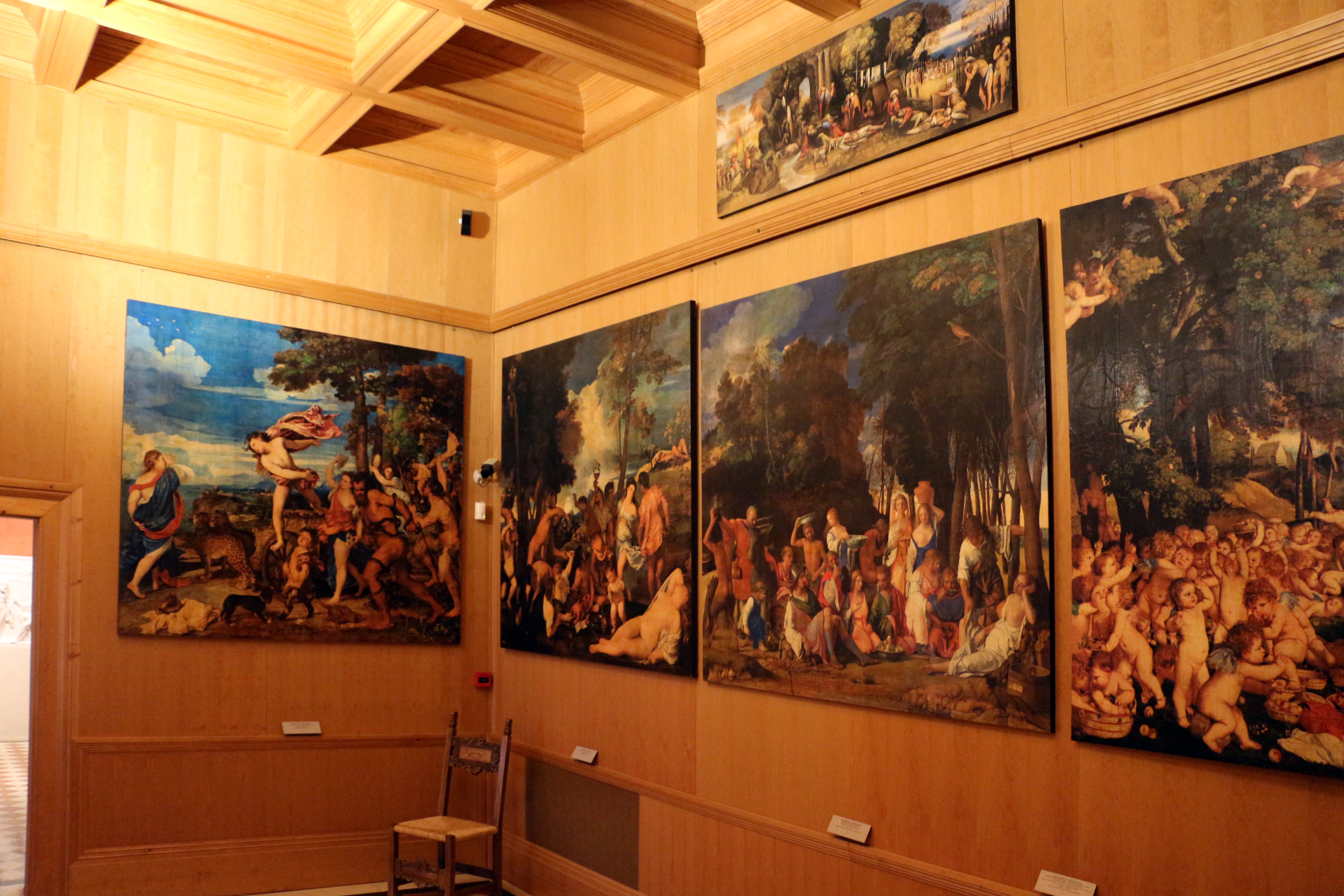 Castello Estense (Ferrara) This is a photo of a monument which is part of cultural heritage of Italy.